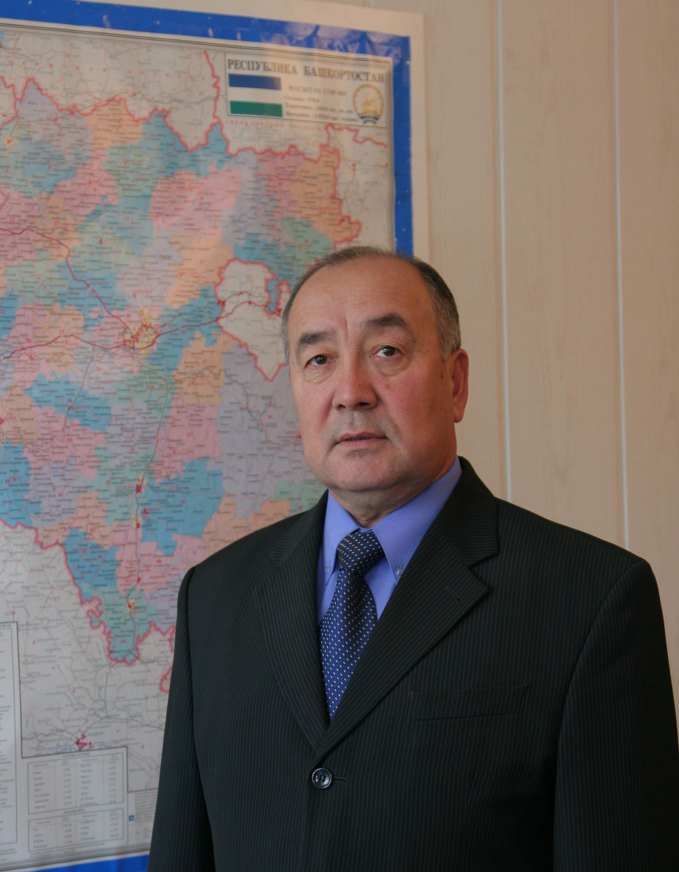 Исмәғилев Рәйес Абдрахман улы - Нефтекама дәүләт филармонияһы директоры